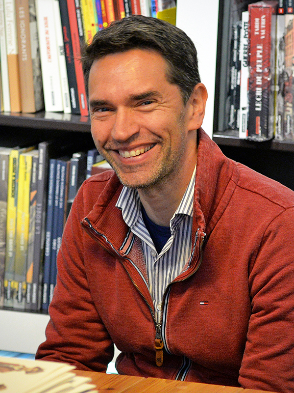 L'auteur Enrico Marini au Mans en novembre 2014.